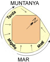 Luz solar de l'Eixample de Barcelona Dibujo realizado por: Josemanuel